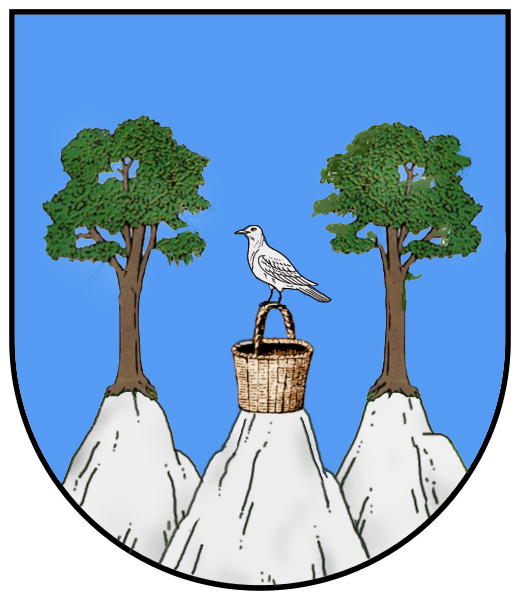 Stemma della famiglia De Cavagnis / De Pezziis (Val Brembana)